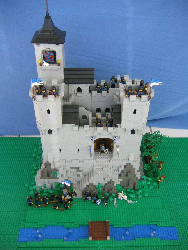 Lego-MOC von Kai Gerkens